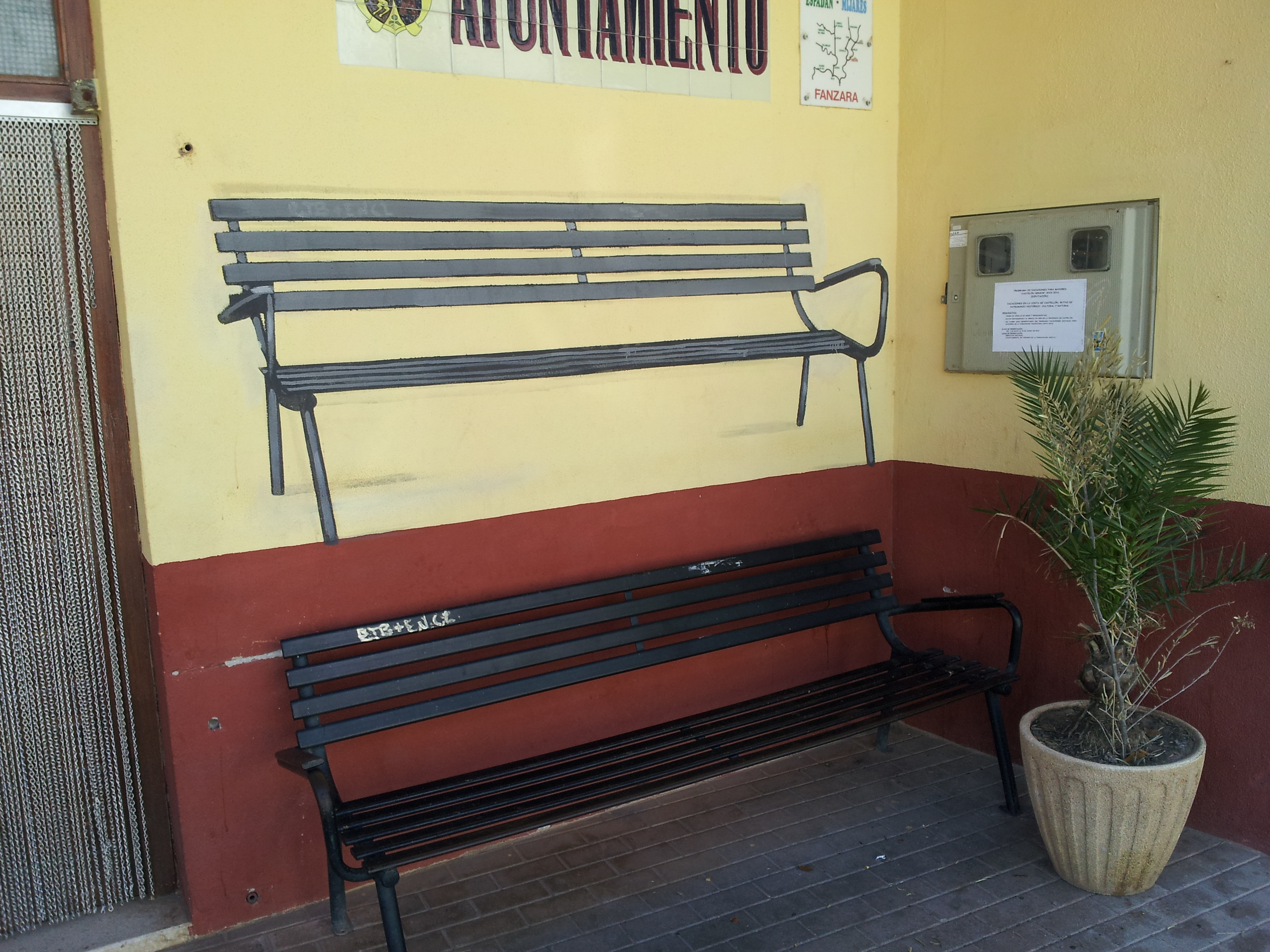 Actuacions a la primera edició del MIAU